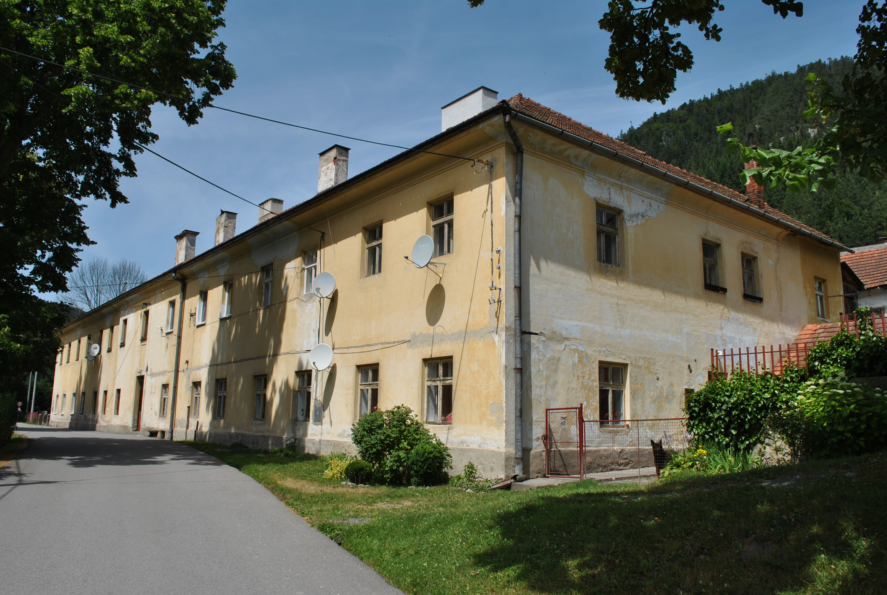 Malužiná - budova bývalého komorského úradu (tzv. Kammerhof)